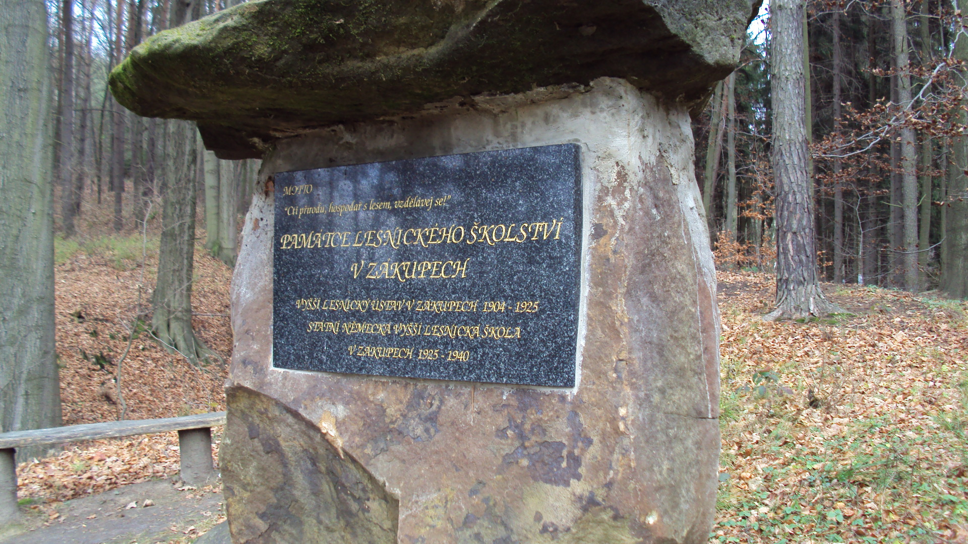 Památník lesního školství na naučné stezce nad křižovatkou Zákupy, Nové Zákupy, Kamenice